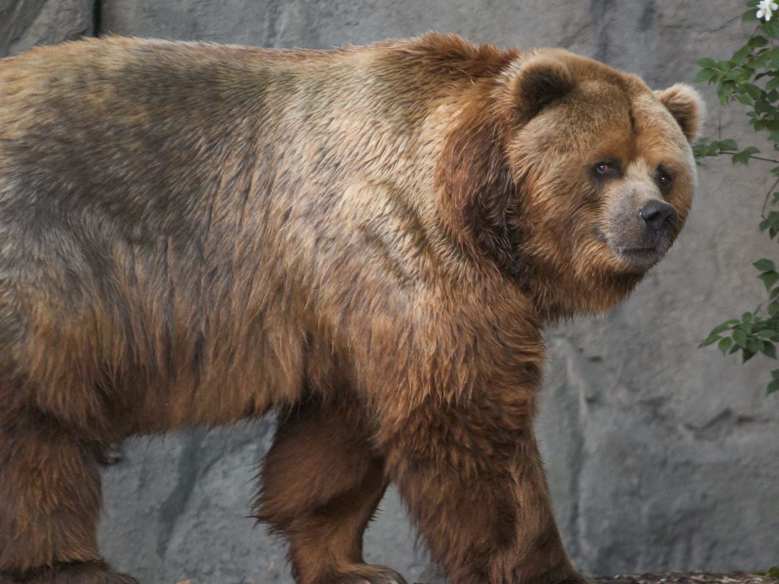 Kodiak Bear looking into Camera